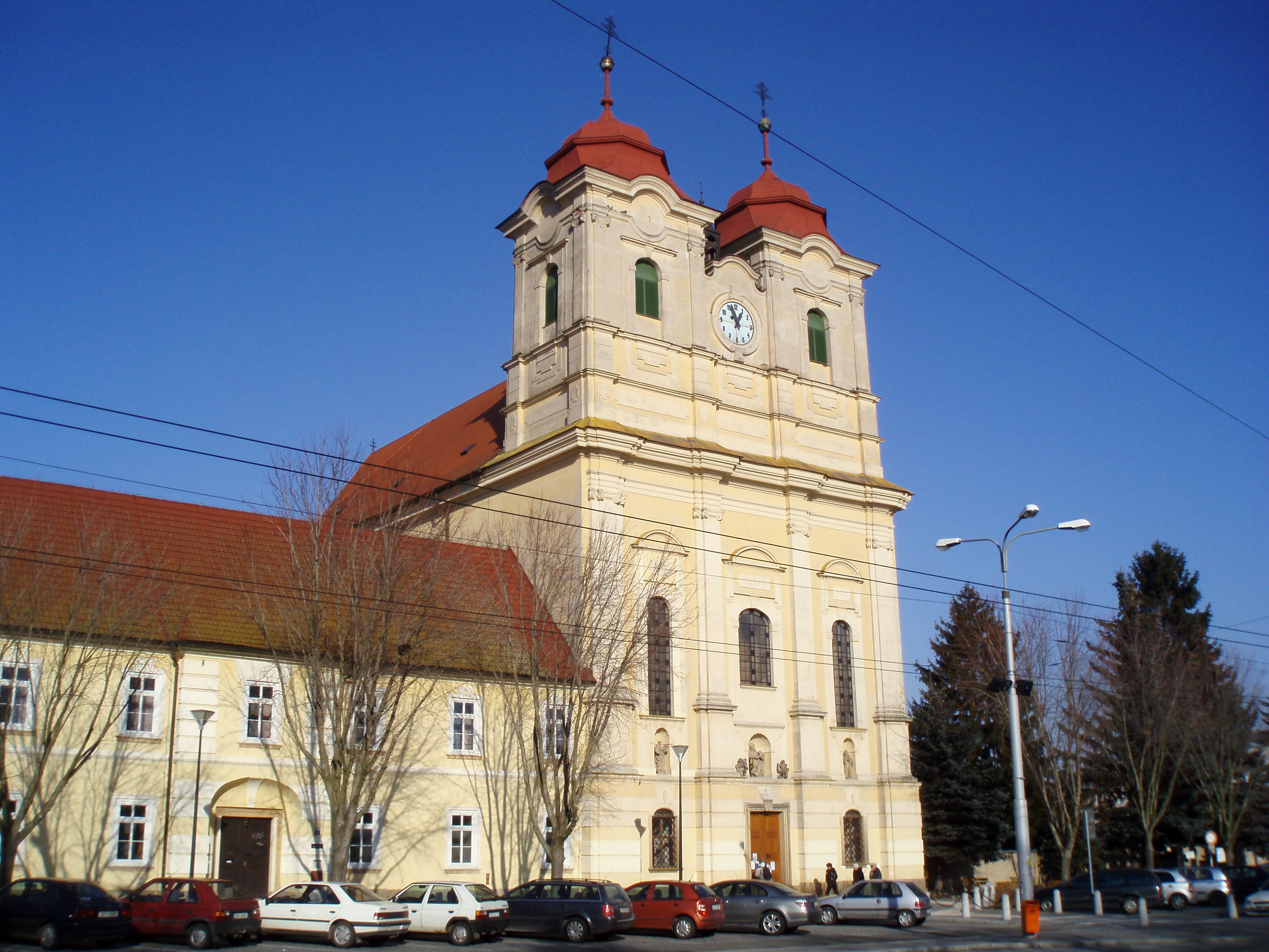 Kostel sv. Anny